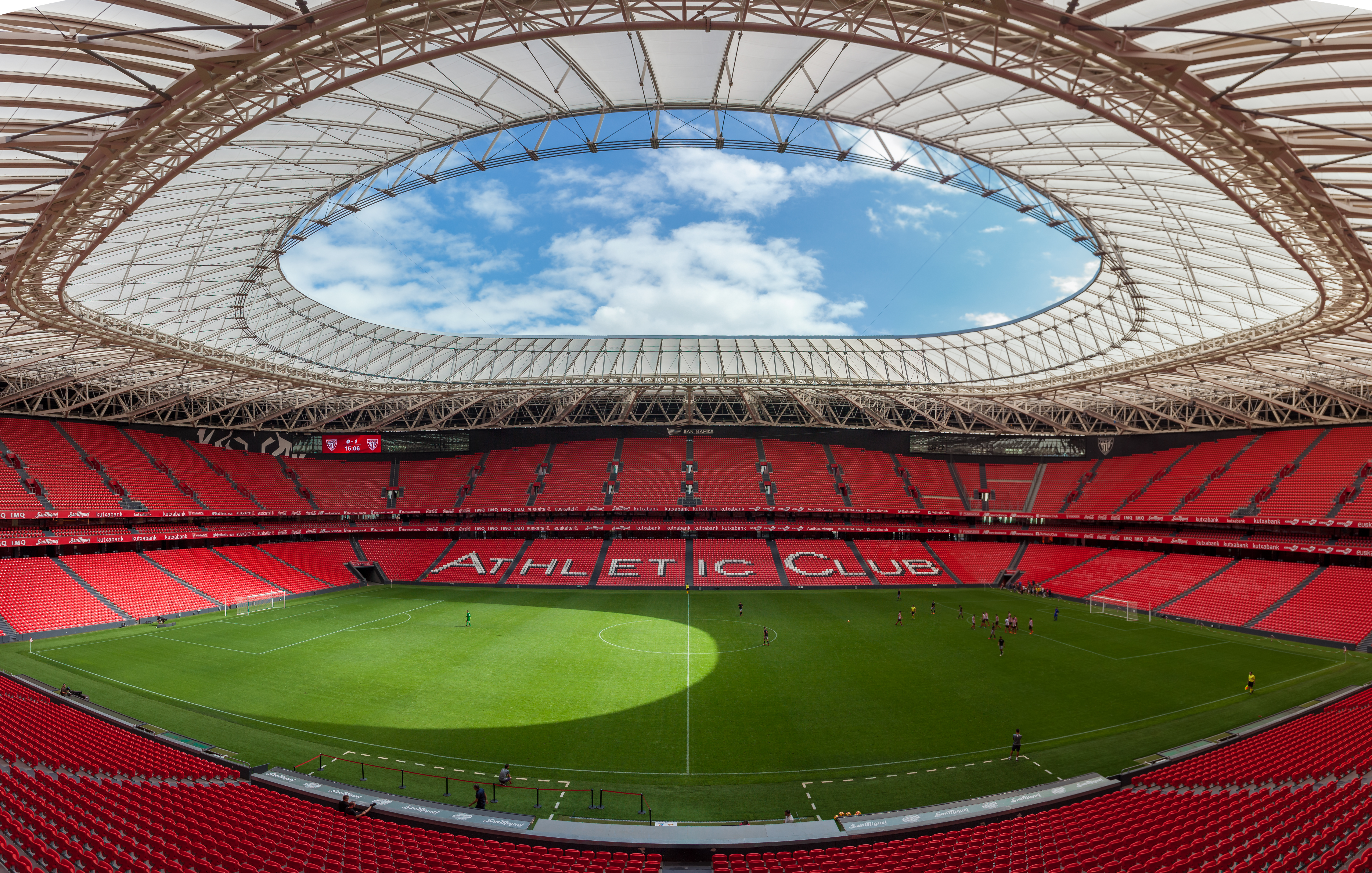 Panorama im San Mamés Stadion